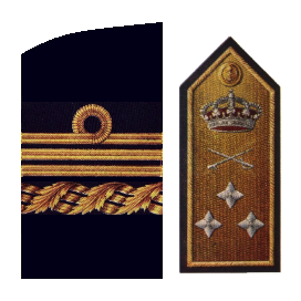 Divisas de Almirante de de la Armada Española. Bocamanga (Dcha.) y pala (Dcha.)